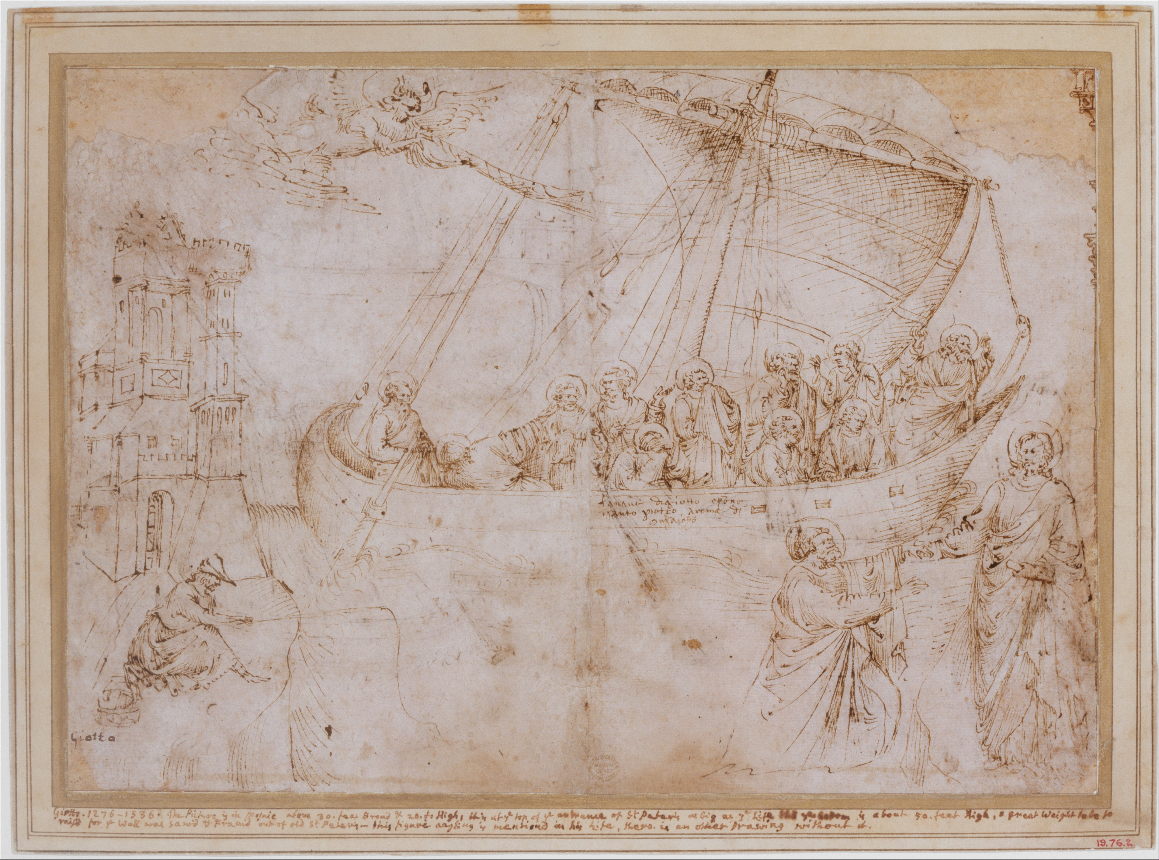 copia della navicella di giotto